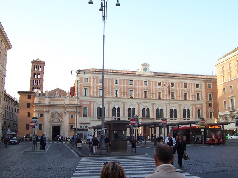 Roma - Piazza S. Silvestro